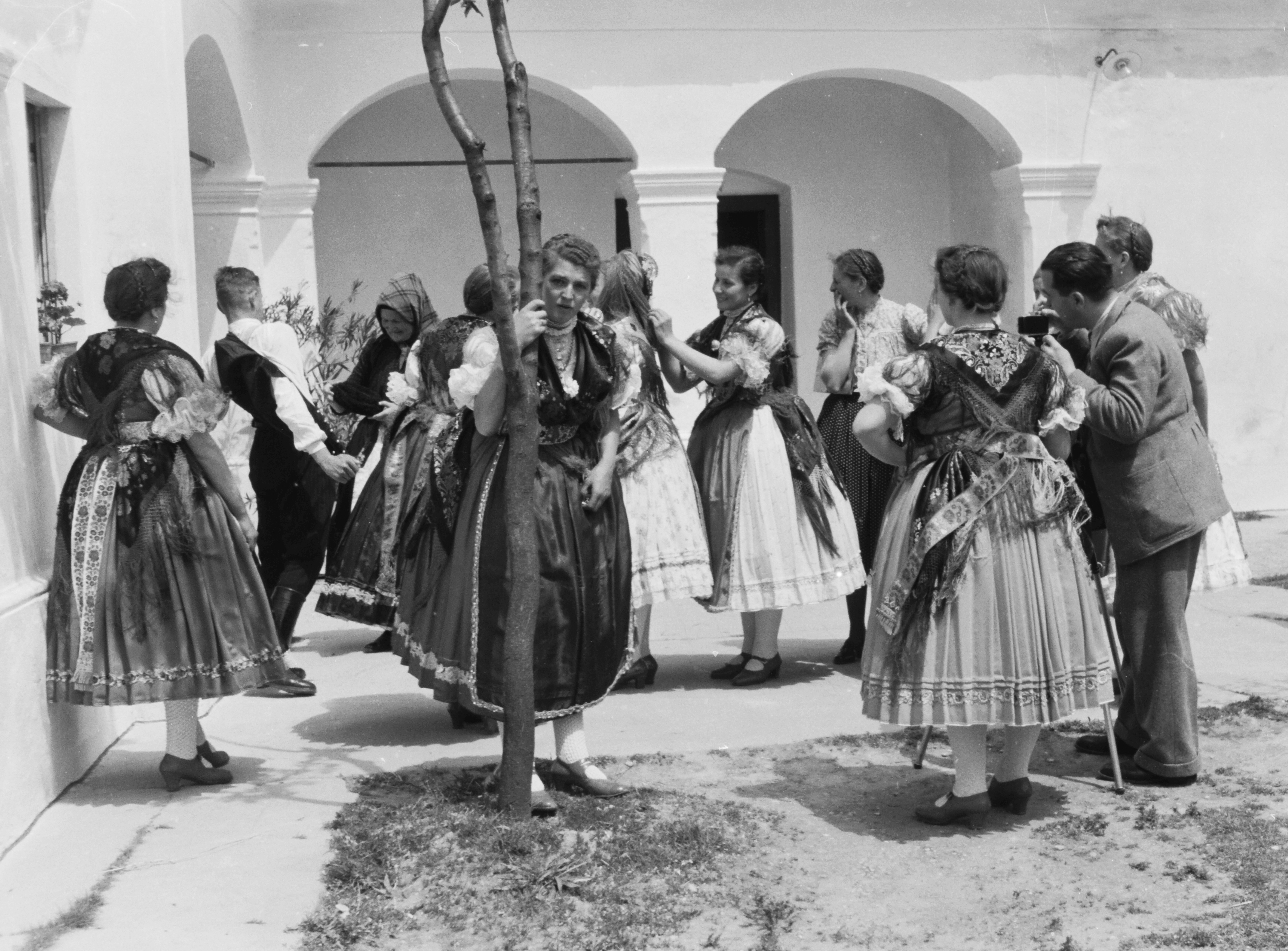 Tags: folk costume, Rábaköz folk costume